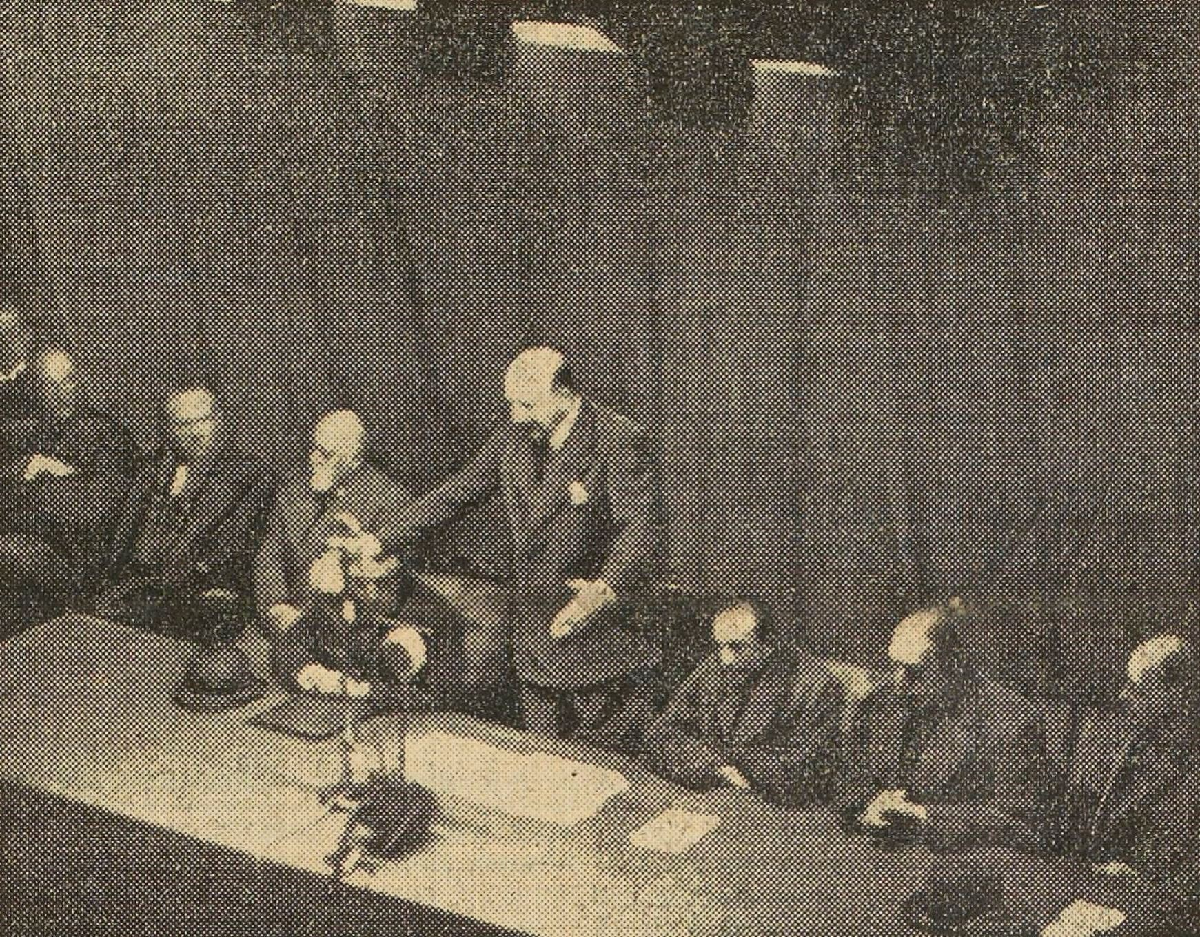 "M. P.-E. Flandin, ministre des Travaux publics, prononçant son discours au congrès d'Arras".